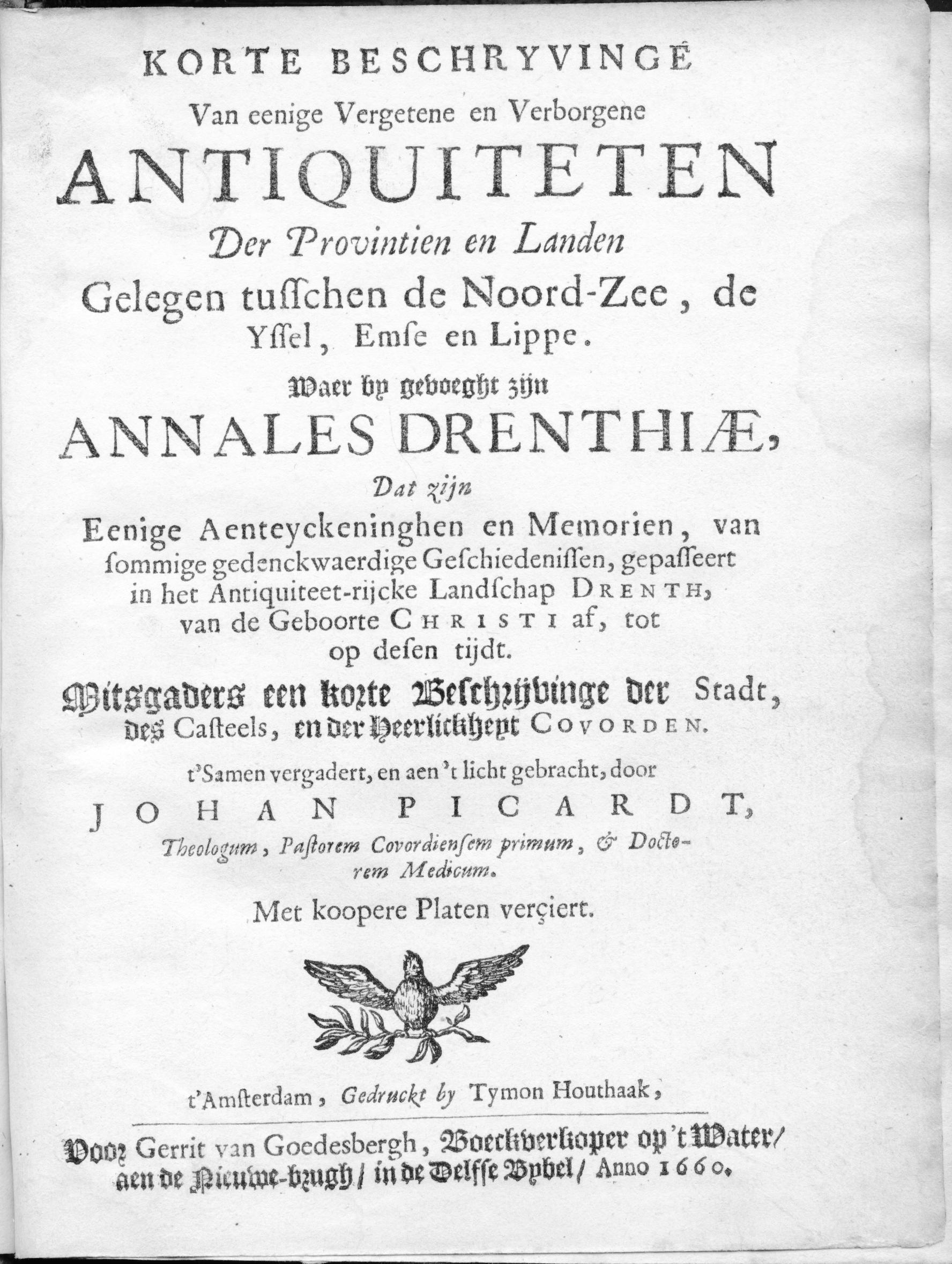 Titelpagina van het boek van Johan Picardt Antiquiteten uit 1660